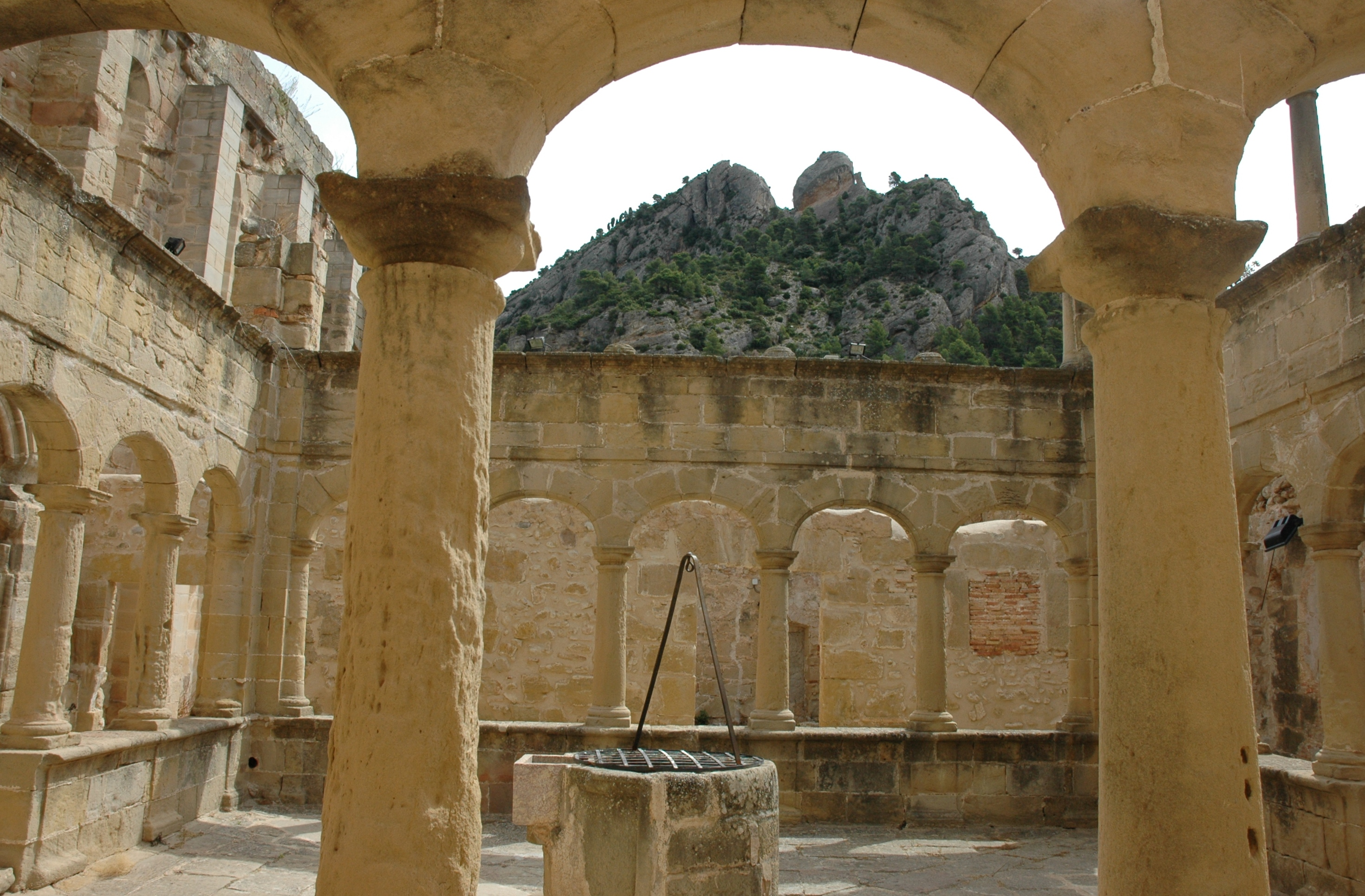 Convent de Sant Salvador d'Horta - Claustre